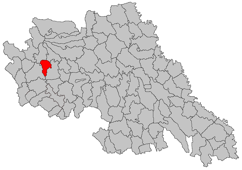 Categorie:Hărţi ale judeţului Iaşi